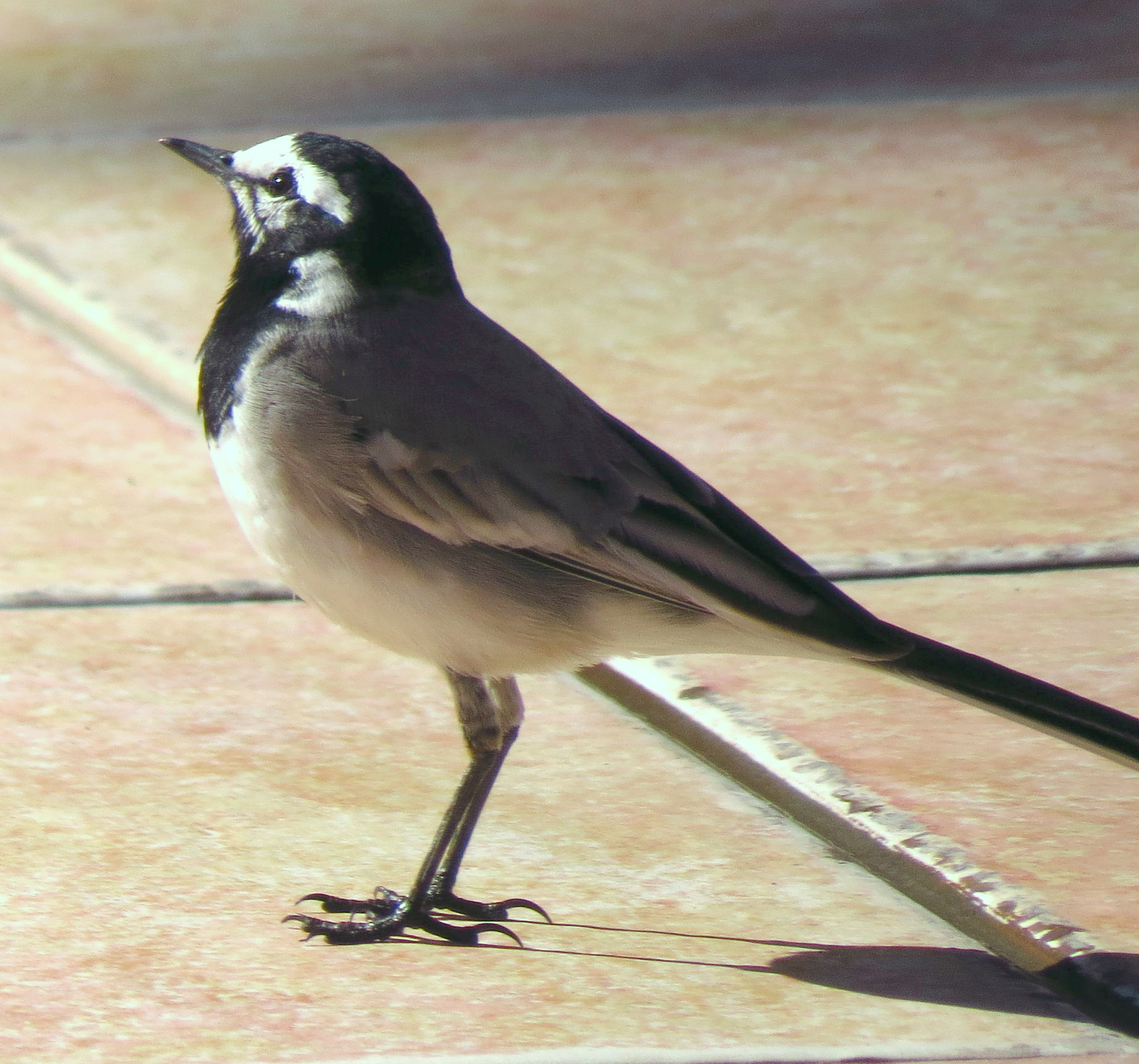 Moroccan Wagtail (Motacilla alba subpersonata), Marrakech, Morocco